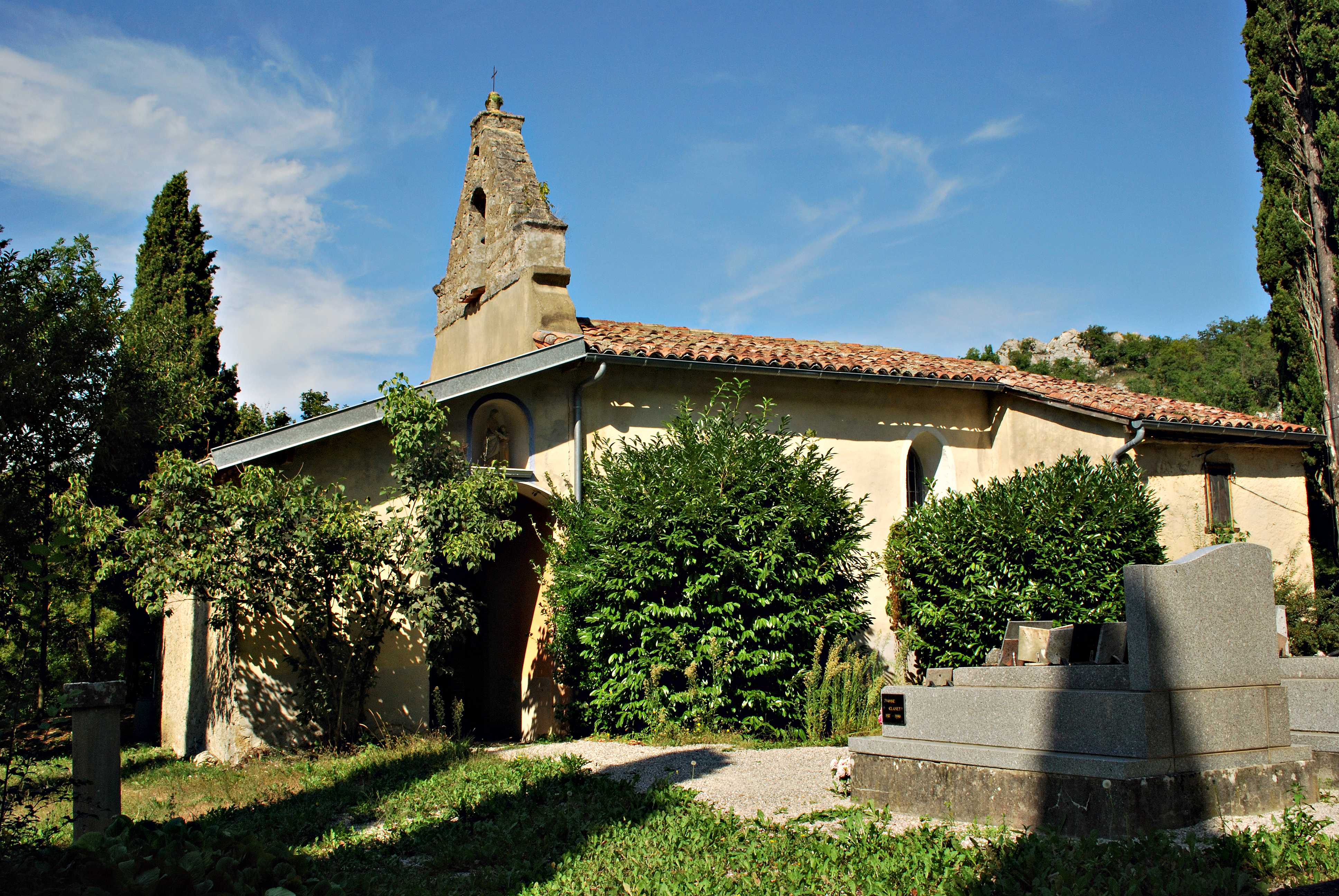 Clocher de l'église Saint-Vincent de Péreille .